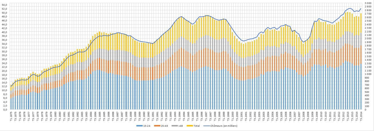 différentes classes d'âges en fonction du temps confrontés au chômage en france